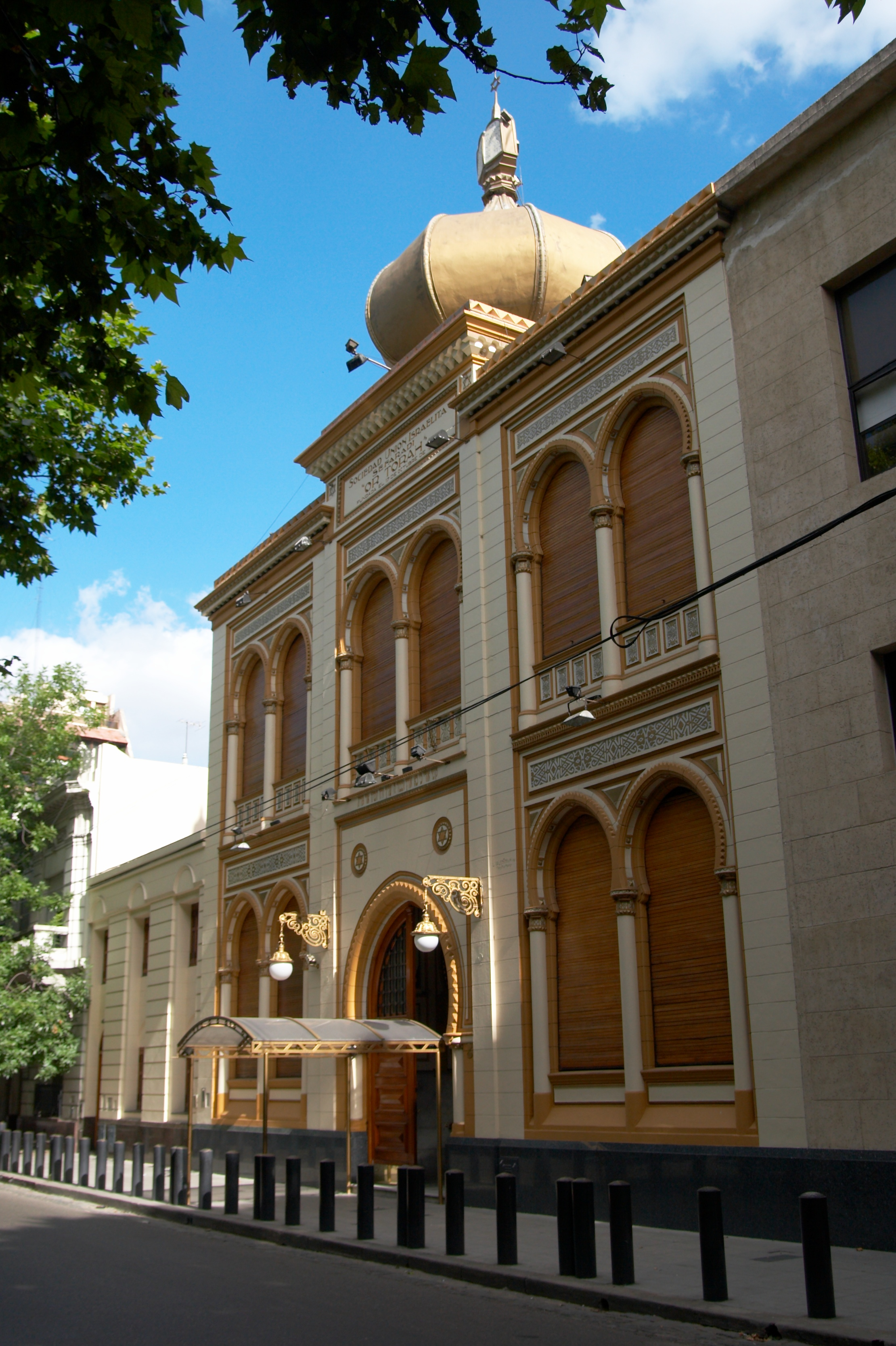 Templo de la Sociedad Unión Israelita Sefaradí Or Torah, calle Brandsen, barrio de Barracas, Buenos Aires, Argentina.